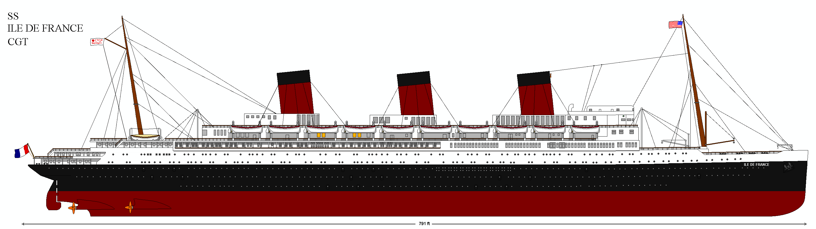 Лайнер "Иль де Франс"